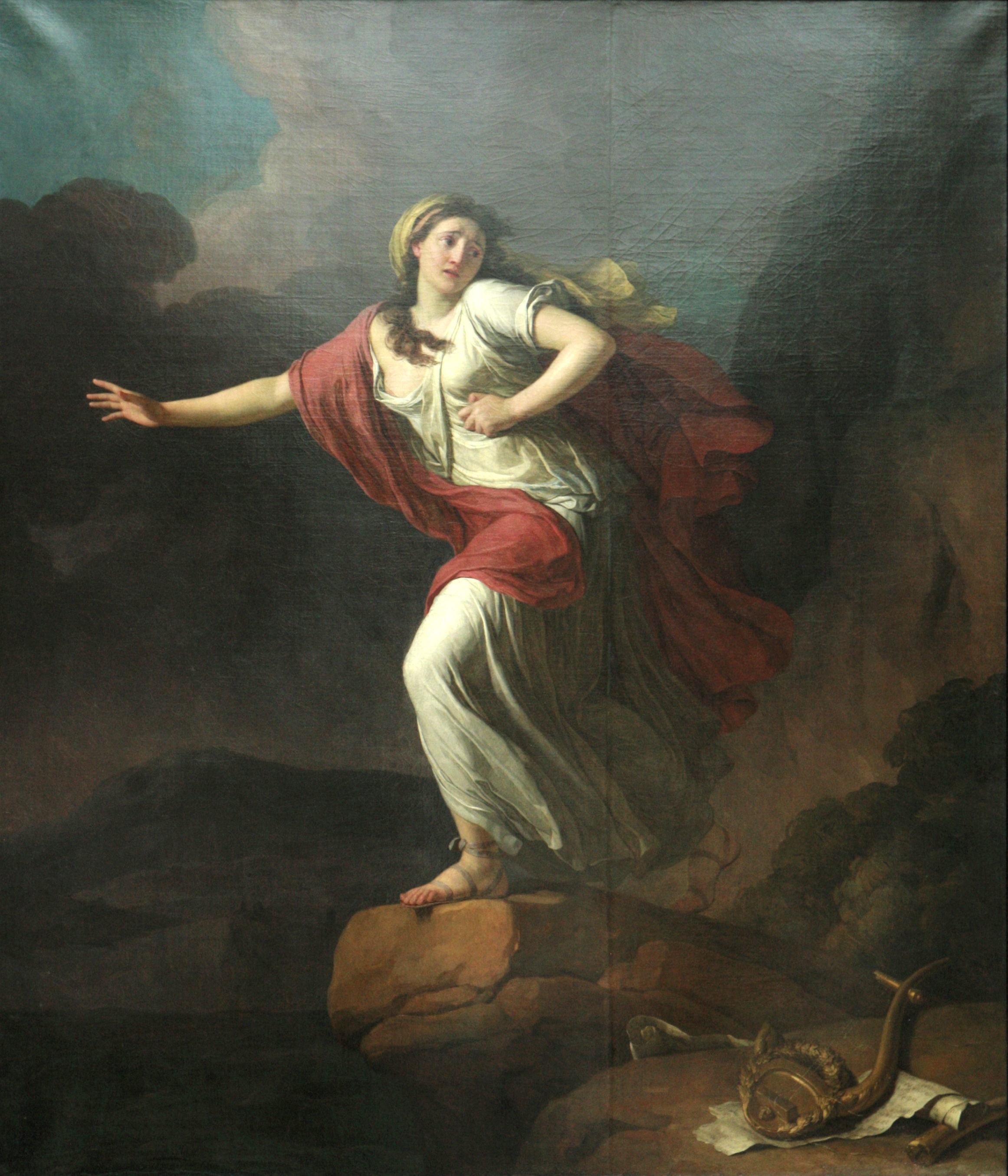 Sapho se précipitant à la mer